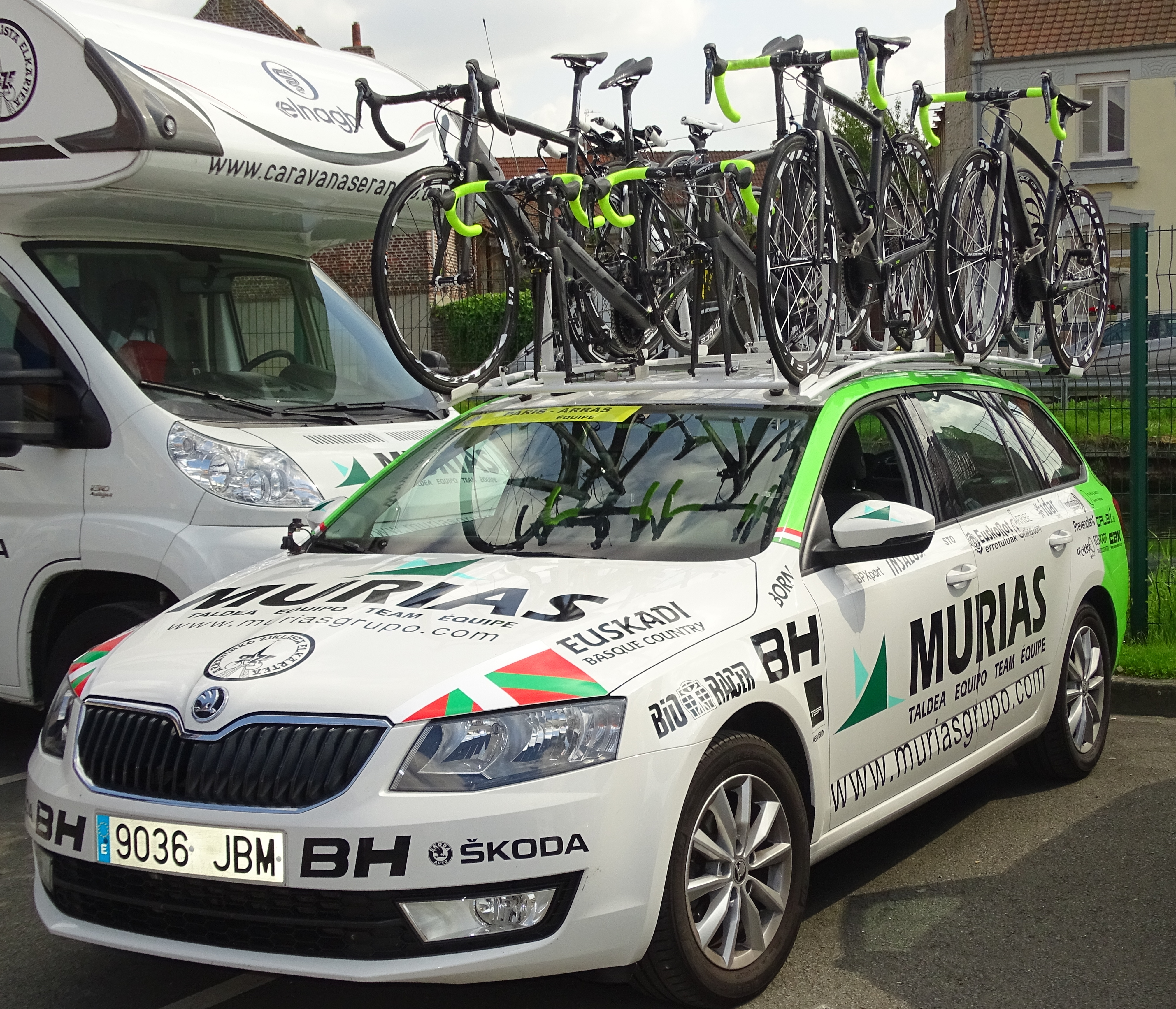 Reportage réalisé le vendredi 22 mai 2015 à l'occasion du départ du contre-la-montre par équipes de la première étape du Paris-Arras Tour 2015 à Vitry-en-Artois, Pas-de-Calais, Nord-Pas-de-Calais, France.